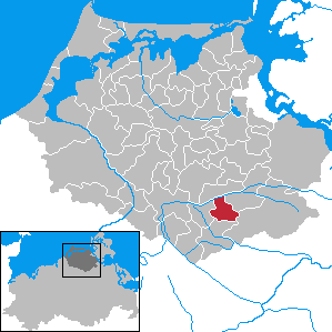 Wendisch Baggendorf in Mecklenburg-Vorpommern - District Nordvorpommern